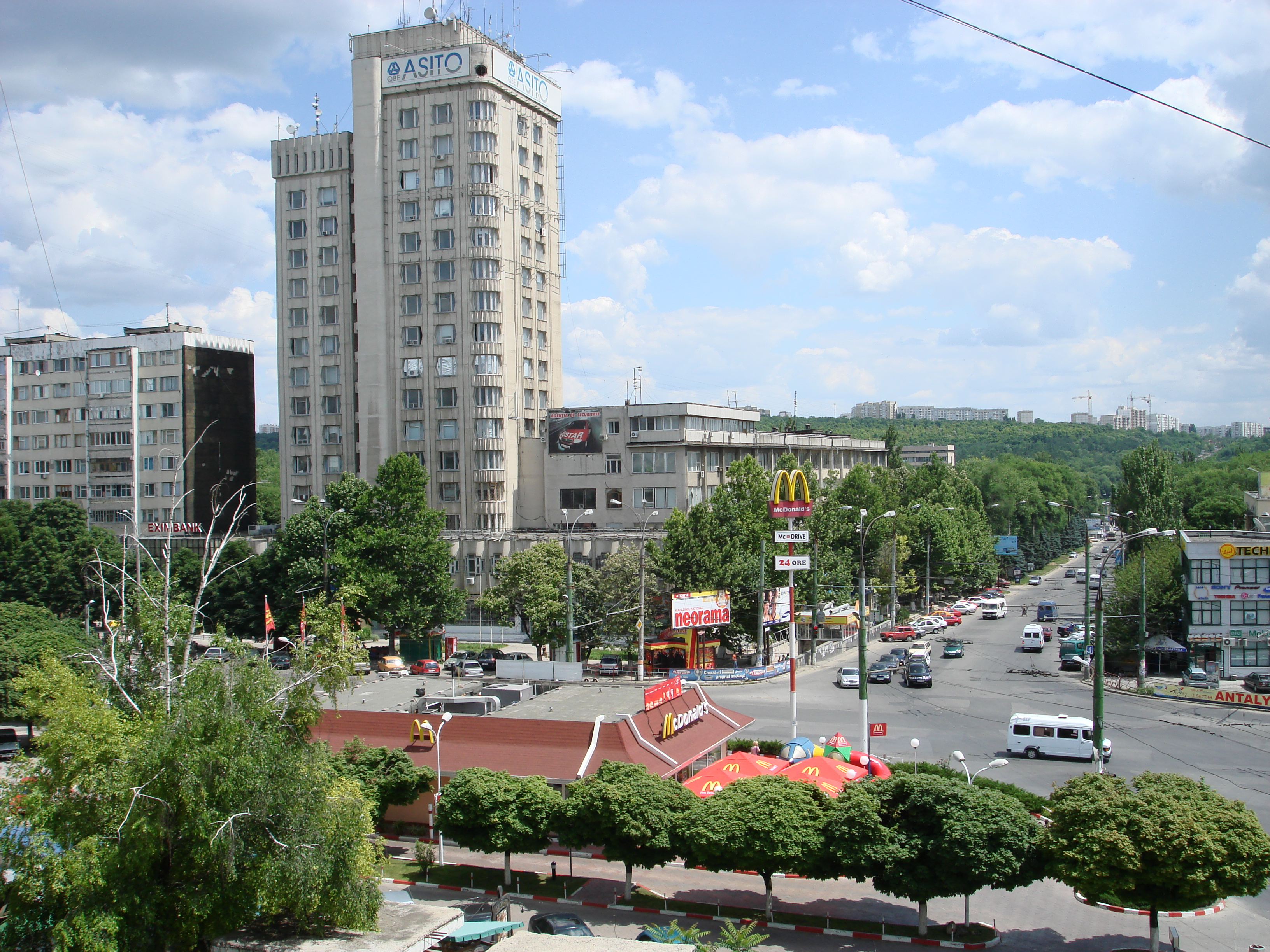 Перекрёсток Московского проспекта и ул. Алеку Руссо.